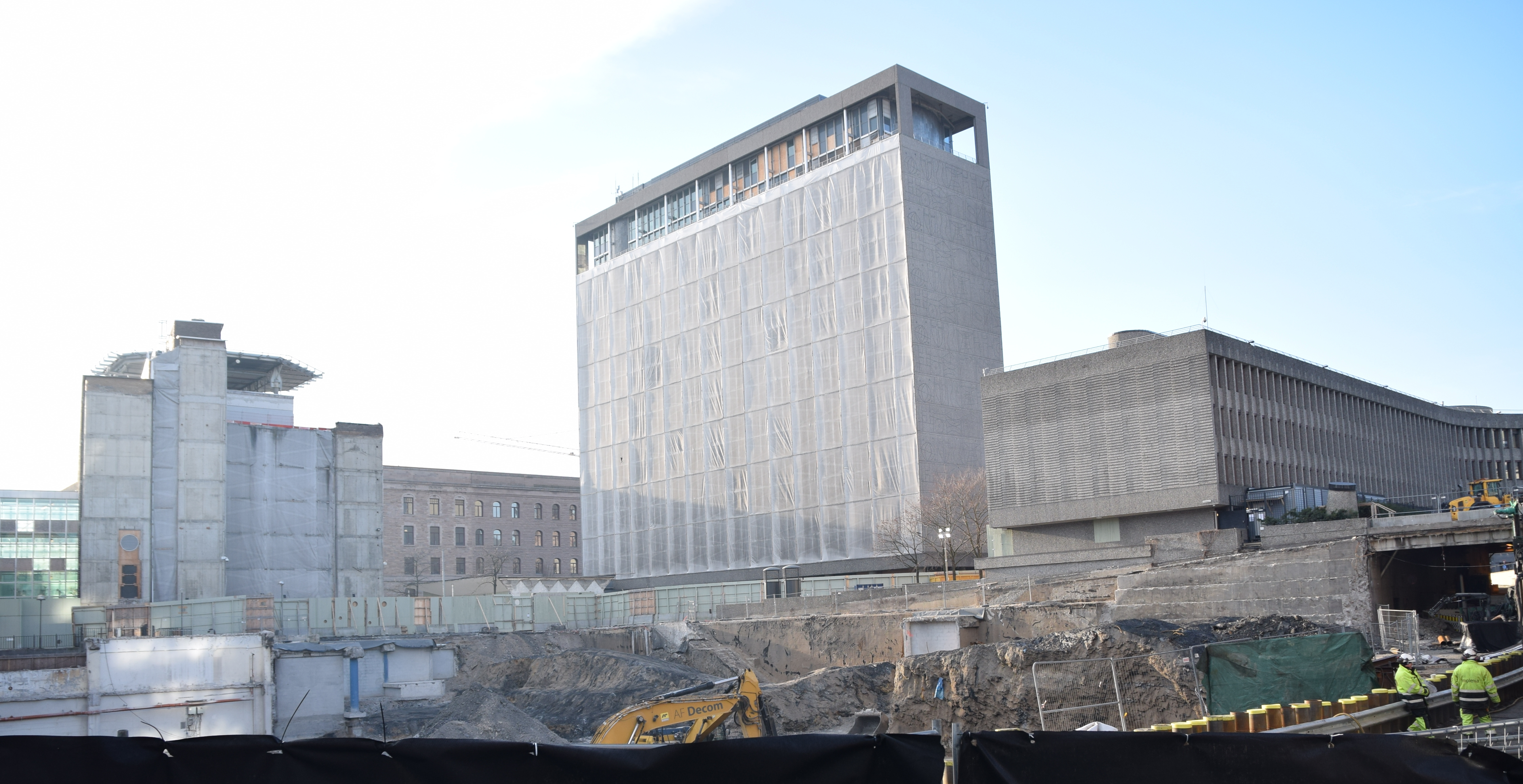 Regjeringskvartalet med hullet etter S-blokken. februar 2015. Y-blokken til høyre, Høyblokken i midten og R4 til venstre